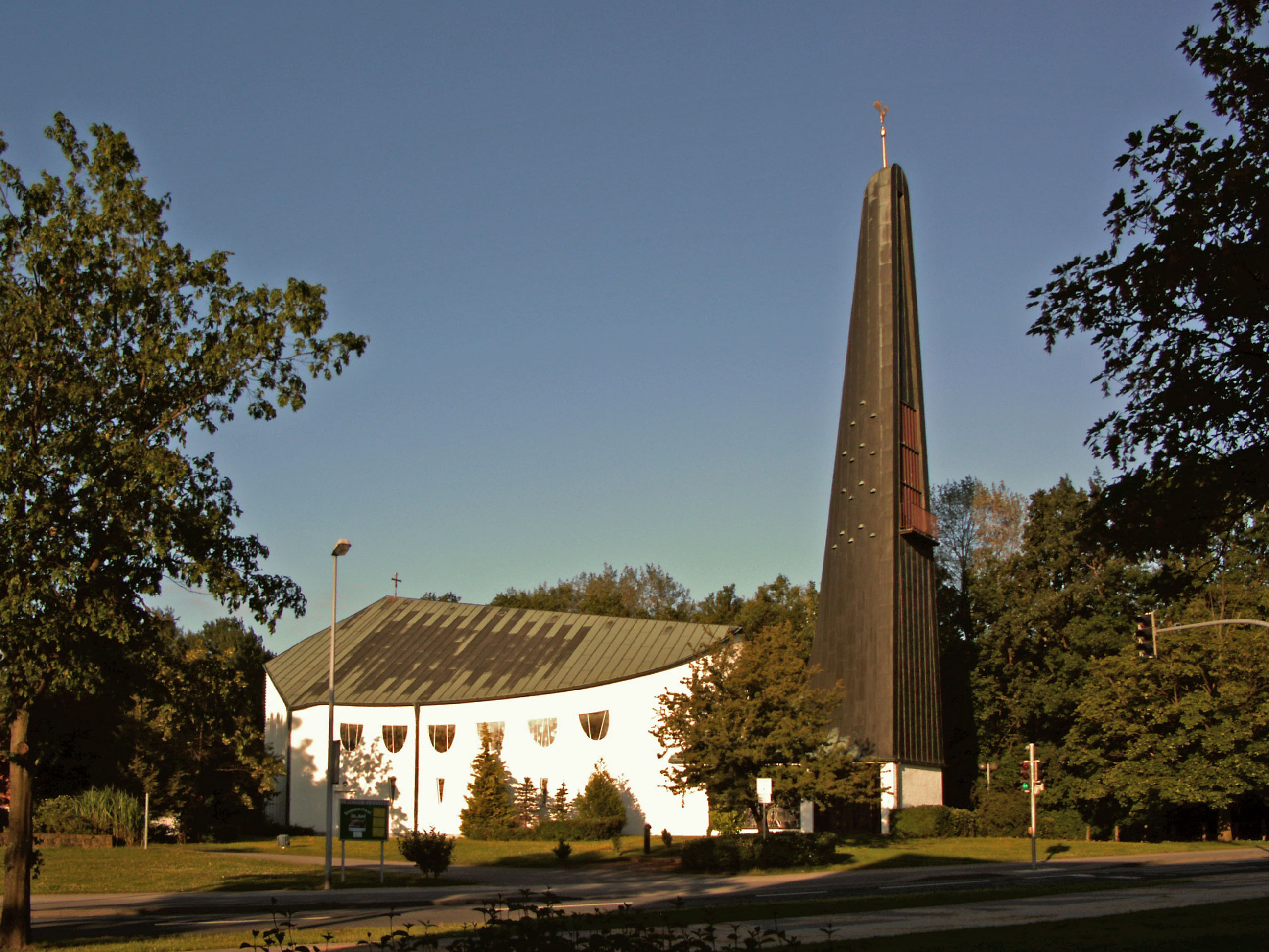 Ev. Pauluskirche in Wolfsburg. Archtitekt: Gerhard Langmaack